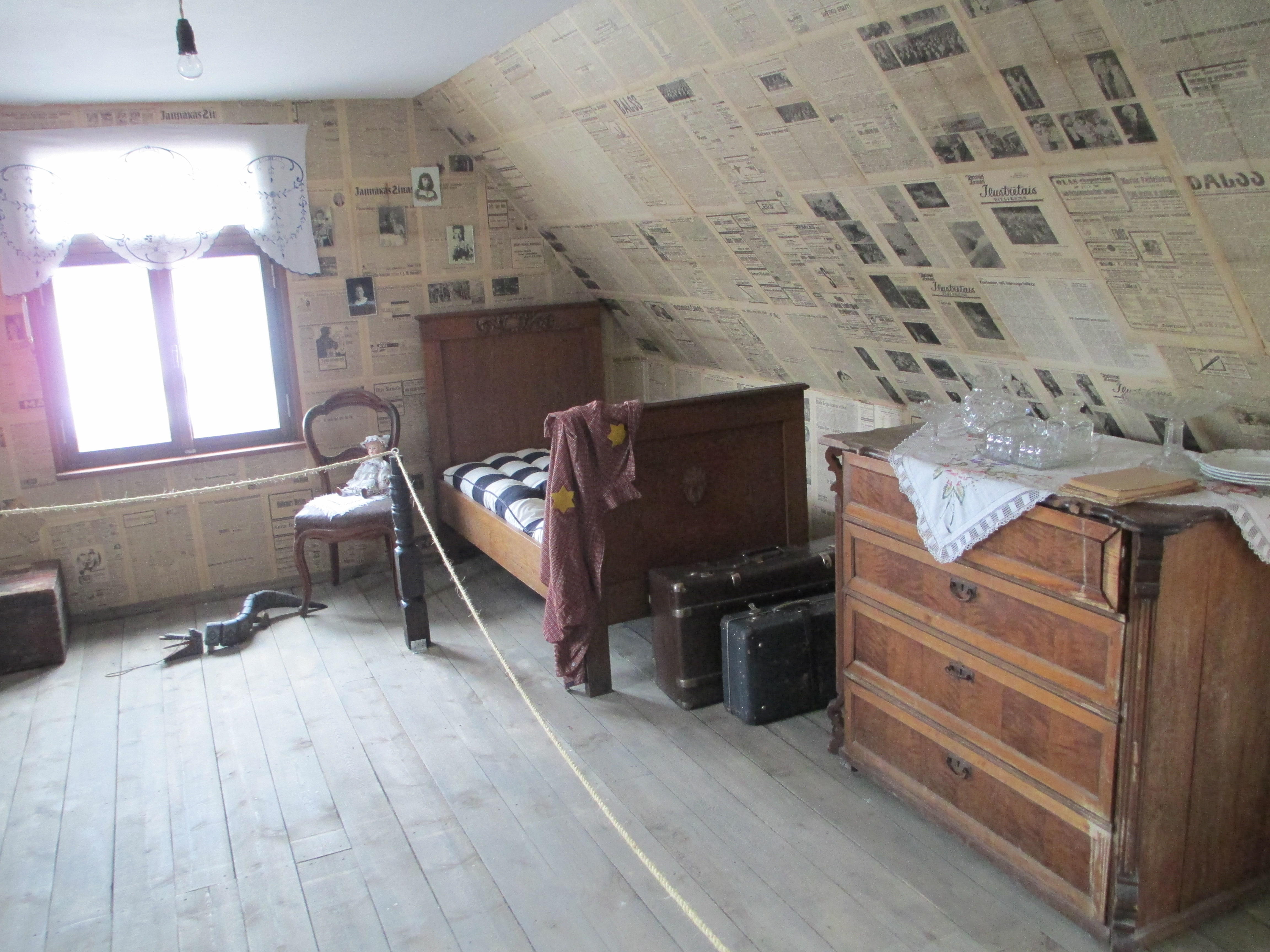 מוזיאון גטו ריגה